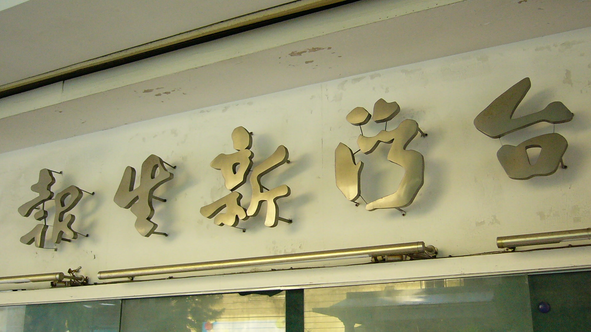 新生報業廣場1樓外牆釘掛的《台灣新生報》于右任題字報頭鑄字招牌。